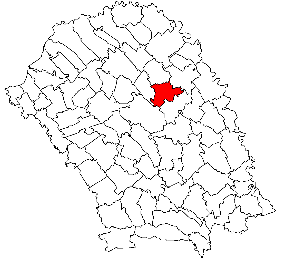 Categorie:Hărţi ale judeţului Botoşani